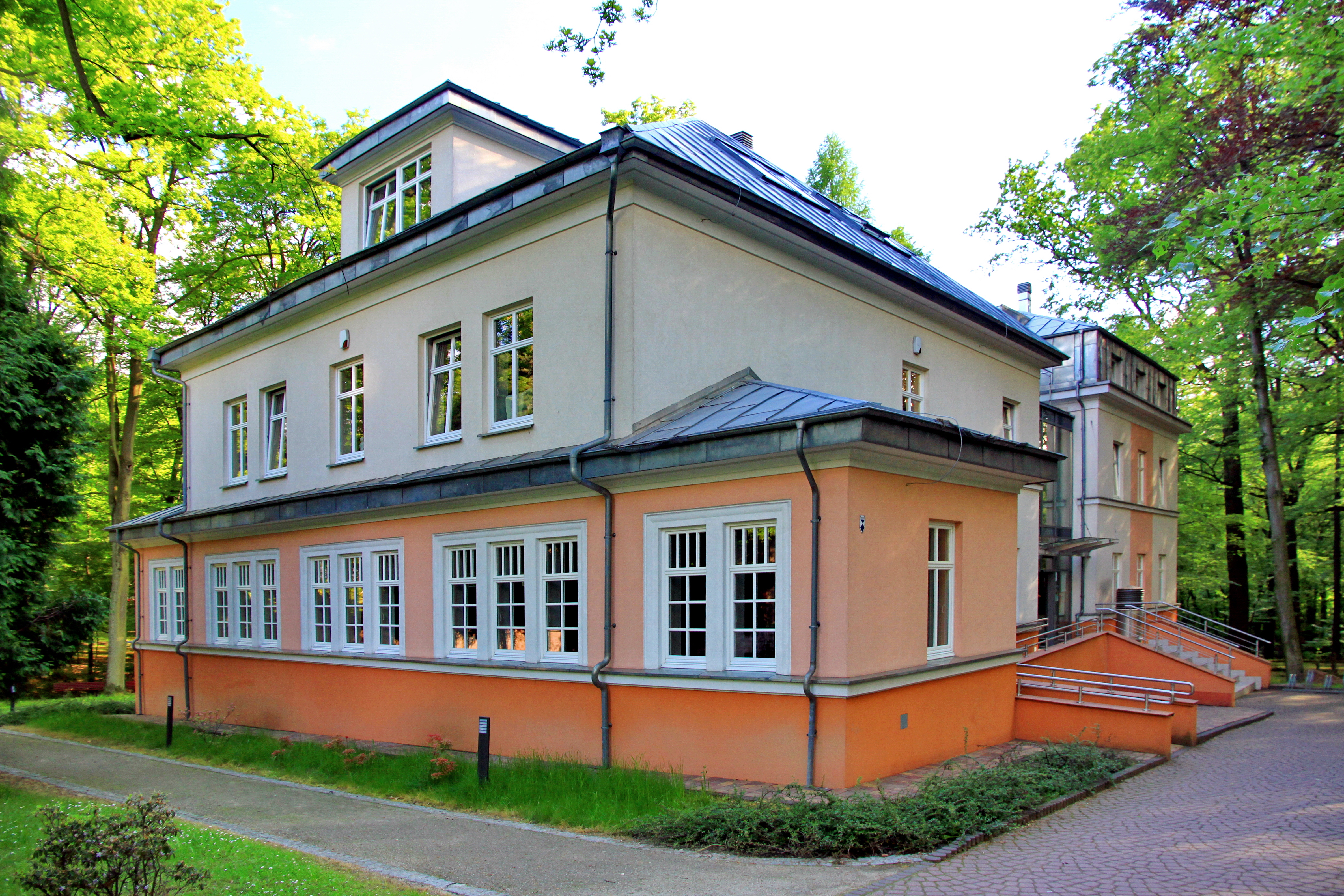 Jastrzębie-Zdrój, Przed wojną siedziba Zarządu Uzdrowiska, po wojnie budynek Zarządu Kąpielowego, nast. budynek mieszkalny, tzw. Masnówka, ob. oddział Miejskiej Biblioteki Publicznej i Biblioteki Uniwersyteckiej oraz kawiarnia, 1912 r.